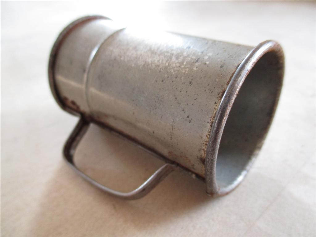 Ein zweiseitiges Kaffeelot, für zwei und vier Tassen